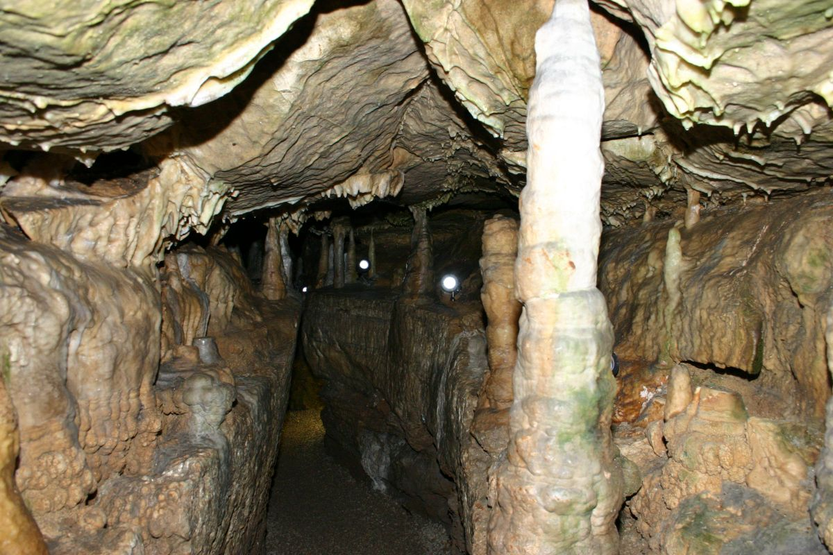 Binghöhle bei Streitberg